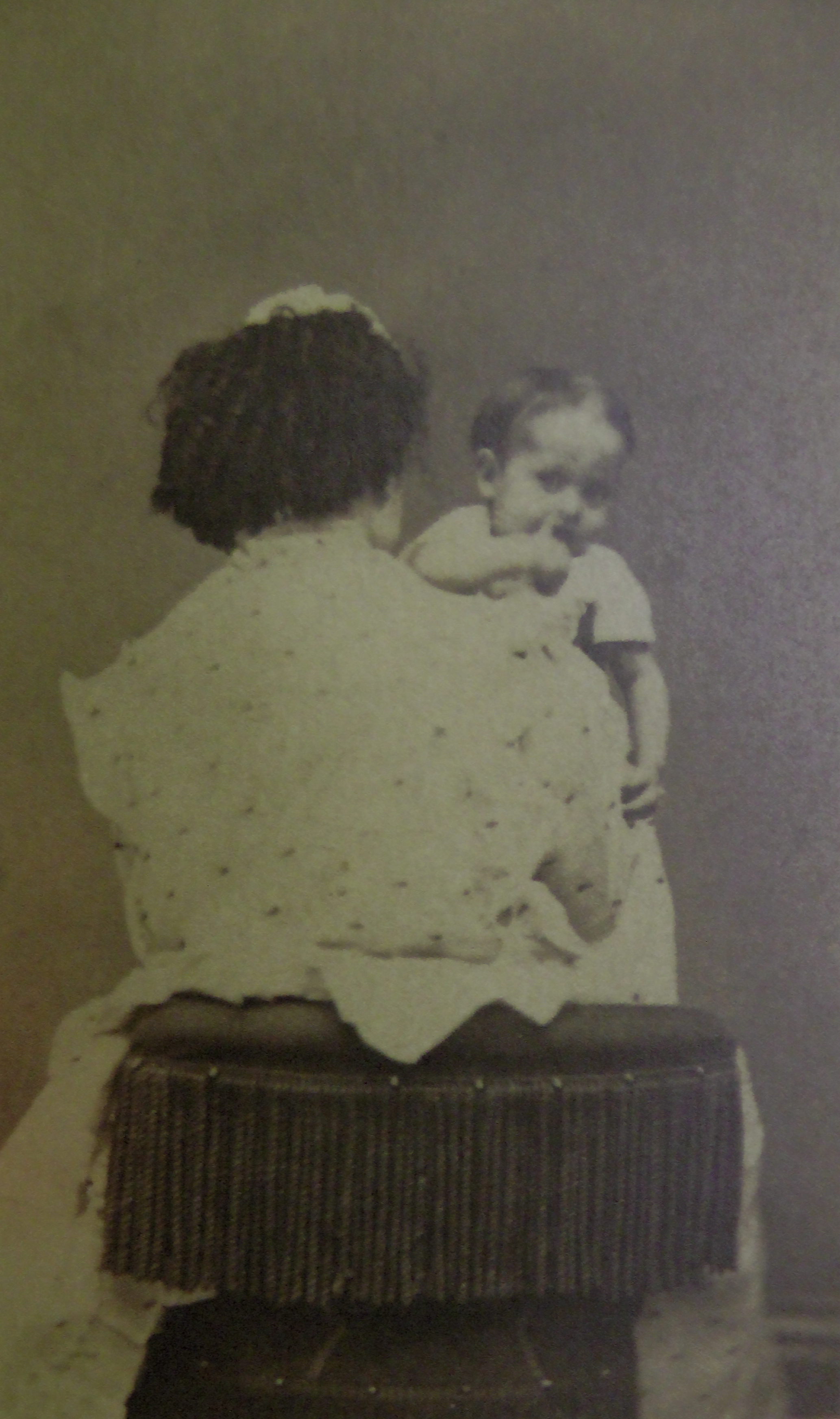 Коллекция Linda Fregni Nagler, № 0252, 10 х 6 см